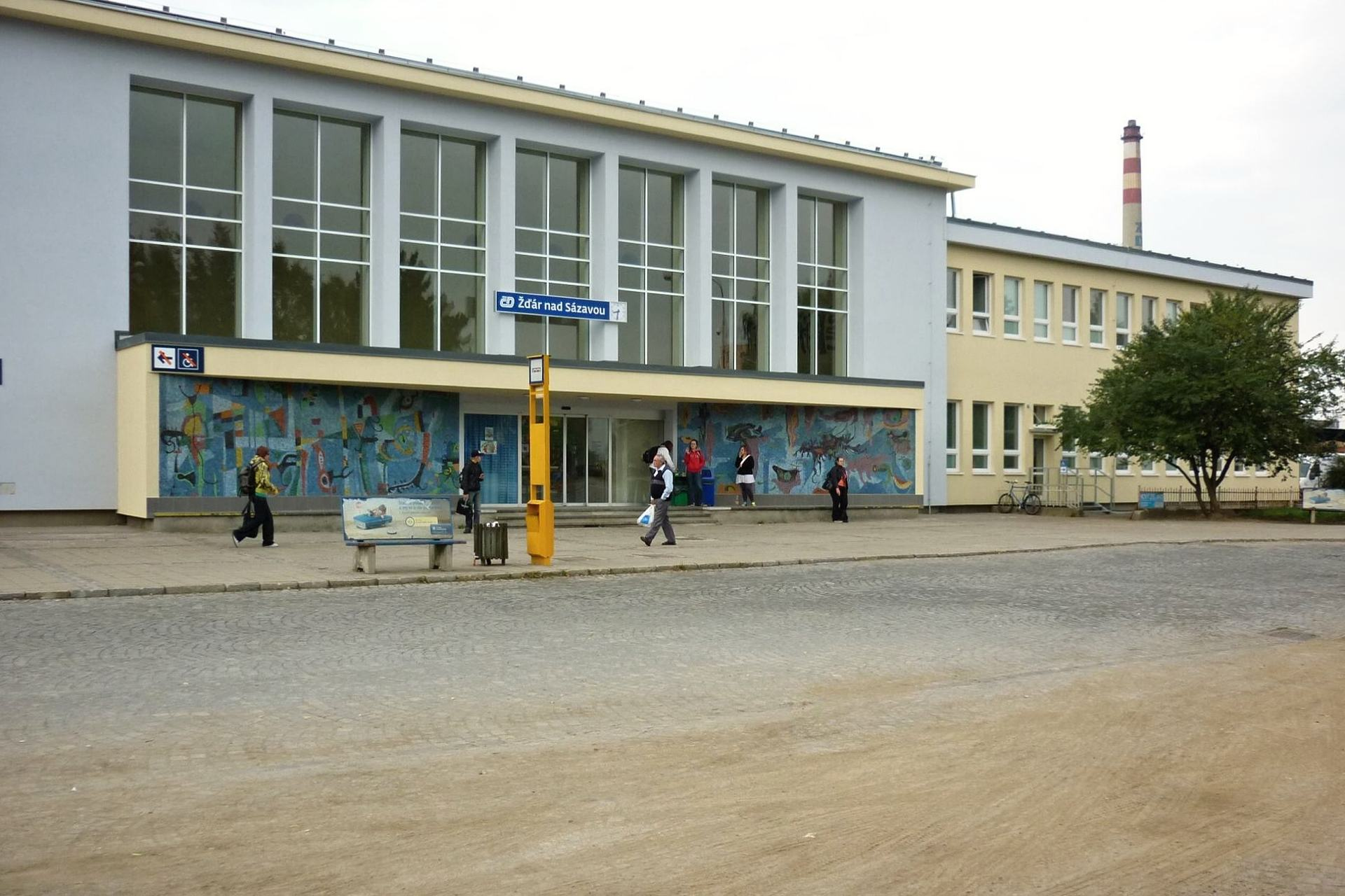 Železniční stanice ve Žďáru nad Sázavou. Mozaika. Instalována roku 1967. Autorem byl akademický malíř Bohumír Matal (1922 - 1988). Mozaika po obou stranách vstupní dveří (podle některých pramenů znázorňuje život na mořském dně) byla realizována podle návrhu významného představitele českého kubismu a je umělecky velmi cenná.Žďáru nad Sázavou. Okr. Jihlava. Kraj Vysočina. Czech Republik.